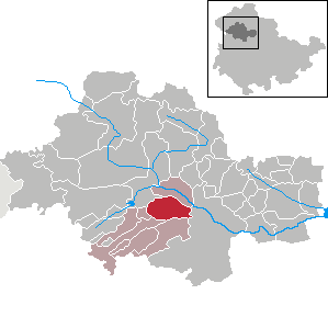 Großengottern in Thuringia - Unstrut-Hainich-Kreis